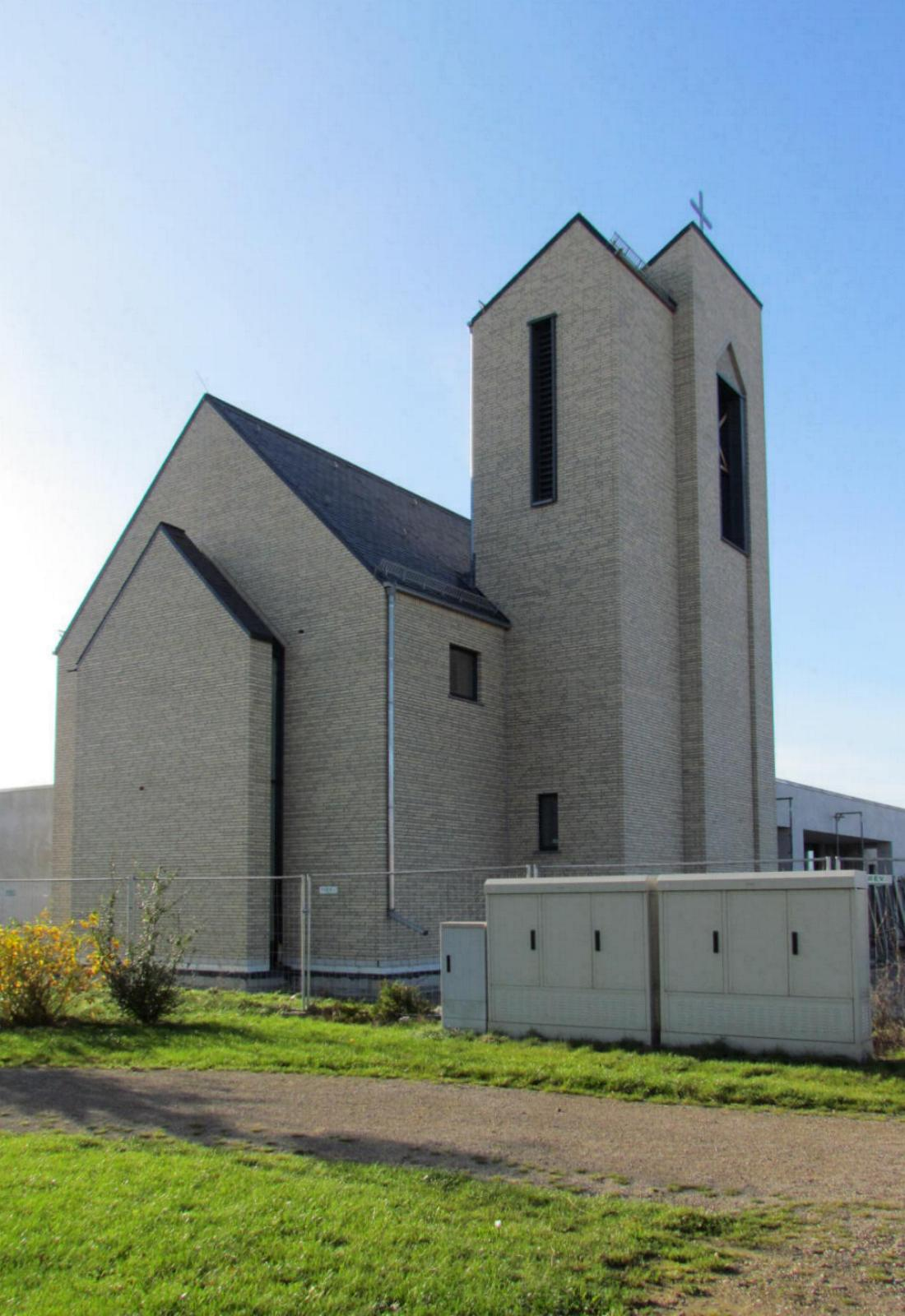 Kapelle St. Lambertus in Immerath (neu)